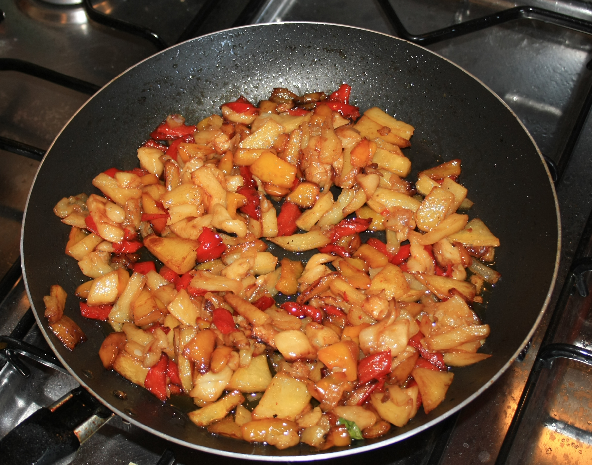 Peperonata: patate, peperoni, melanzane, cipolle.